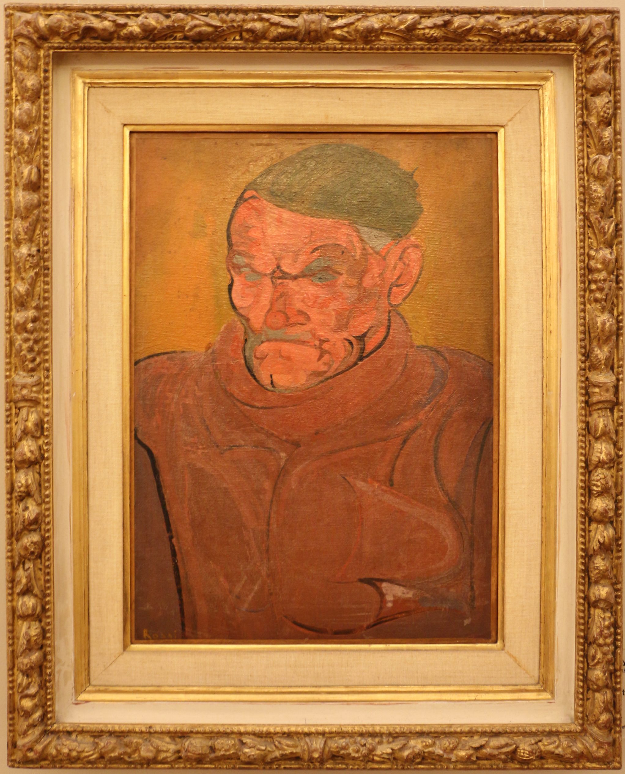 Villa Reale di Milano This is a photo of a monument which is part of cultural heritage of Italy.